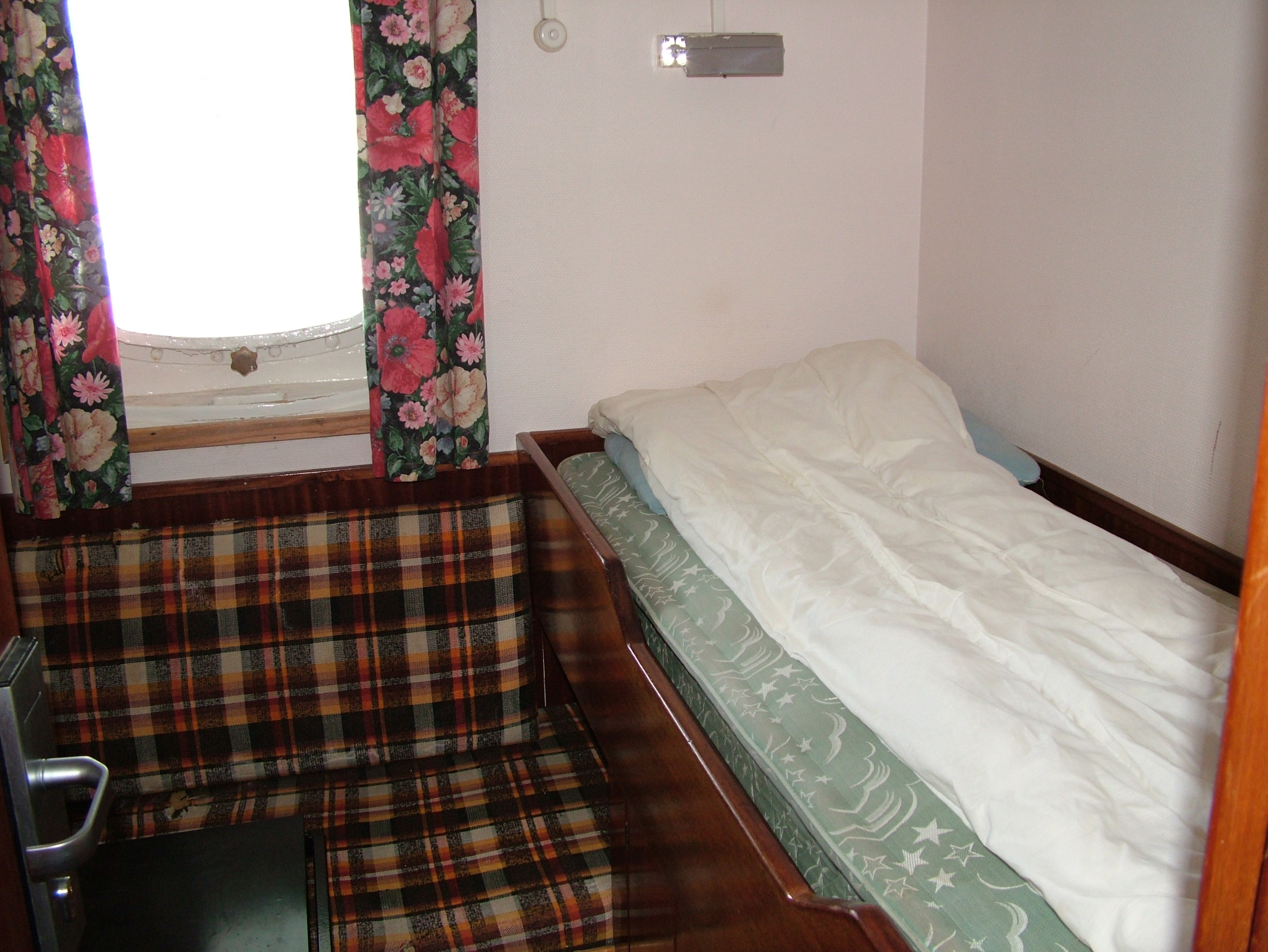 Im Hurtigruten Museum in Stokmarknes, eine Kabine auf der alten MS Finnmarken